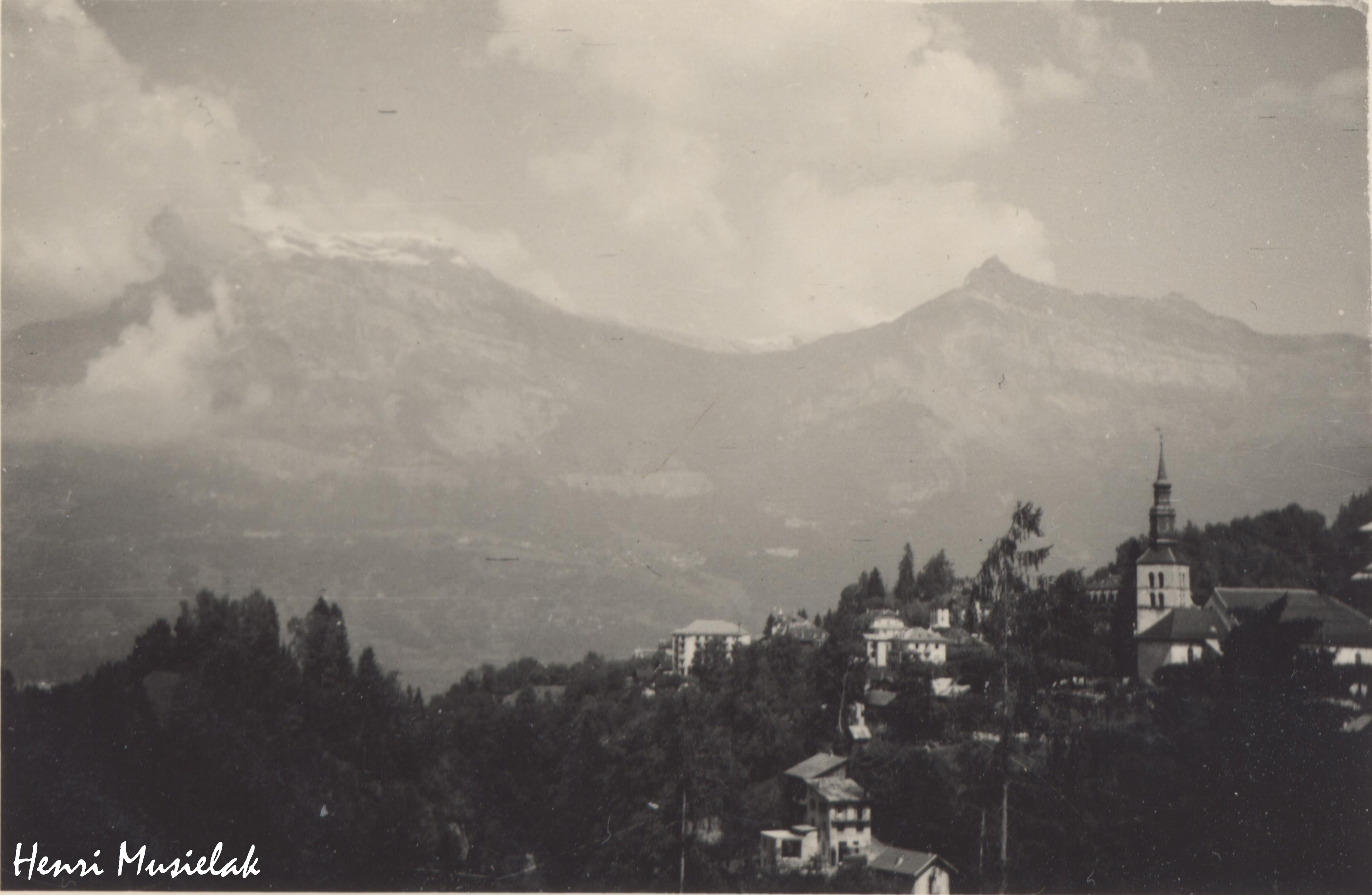 Vue sur Saint-Gervais-les-Bains. Widok kurortu Saint-Gervais-les-Bains w Górnej Sabaudii.